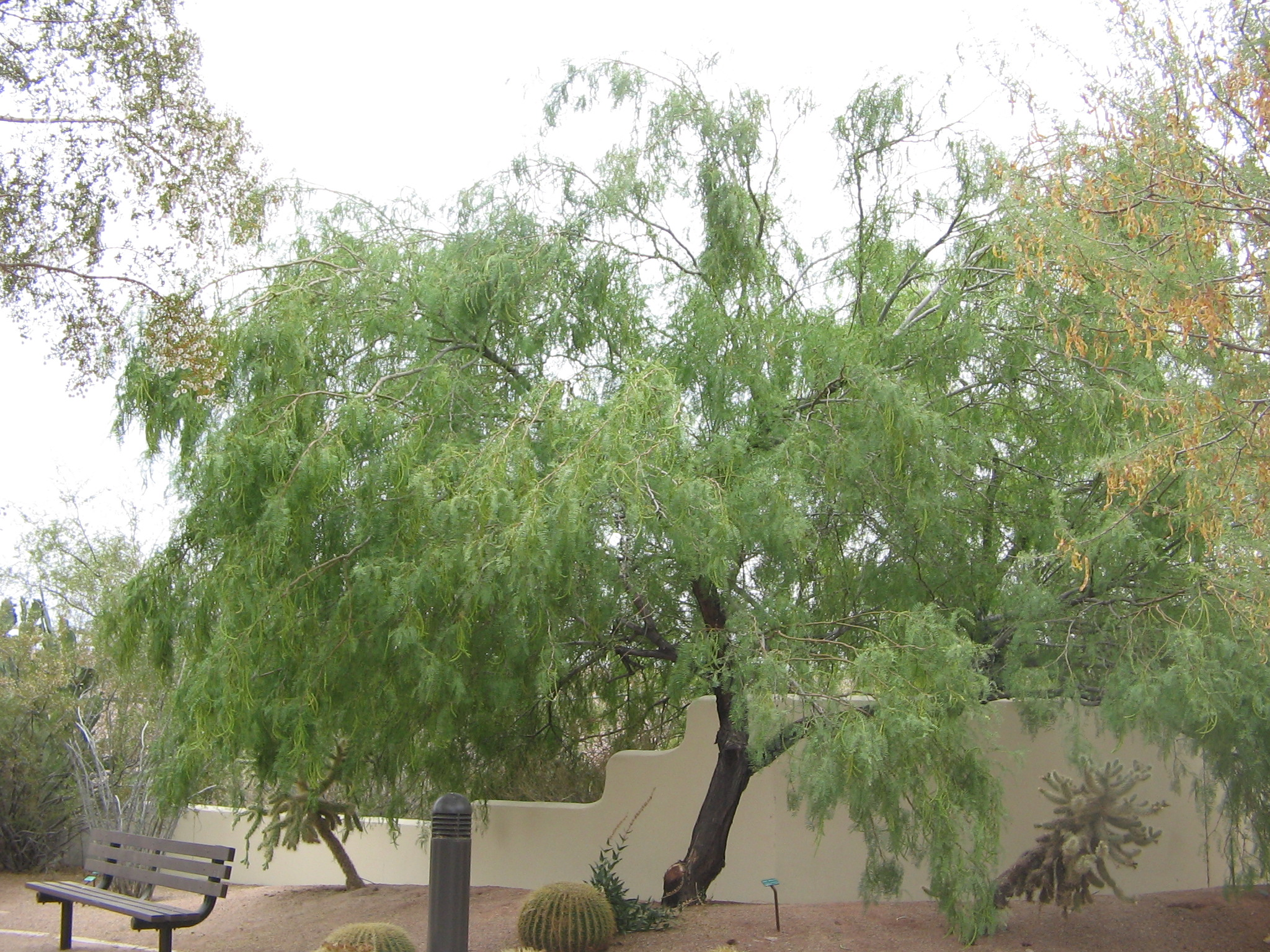 Prosopis glandulosa habit